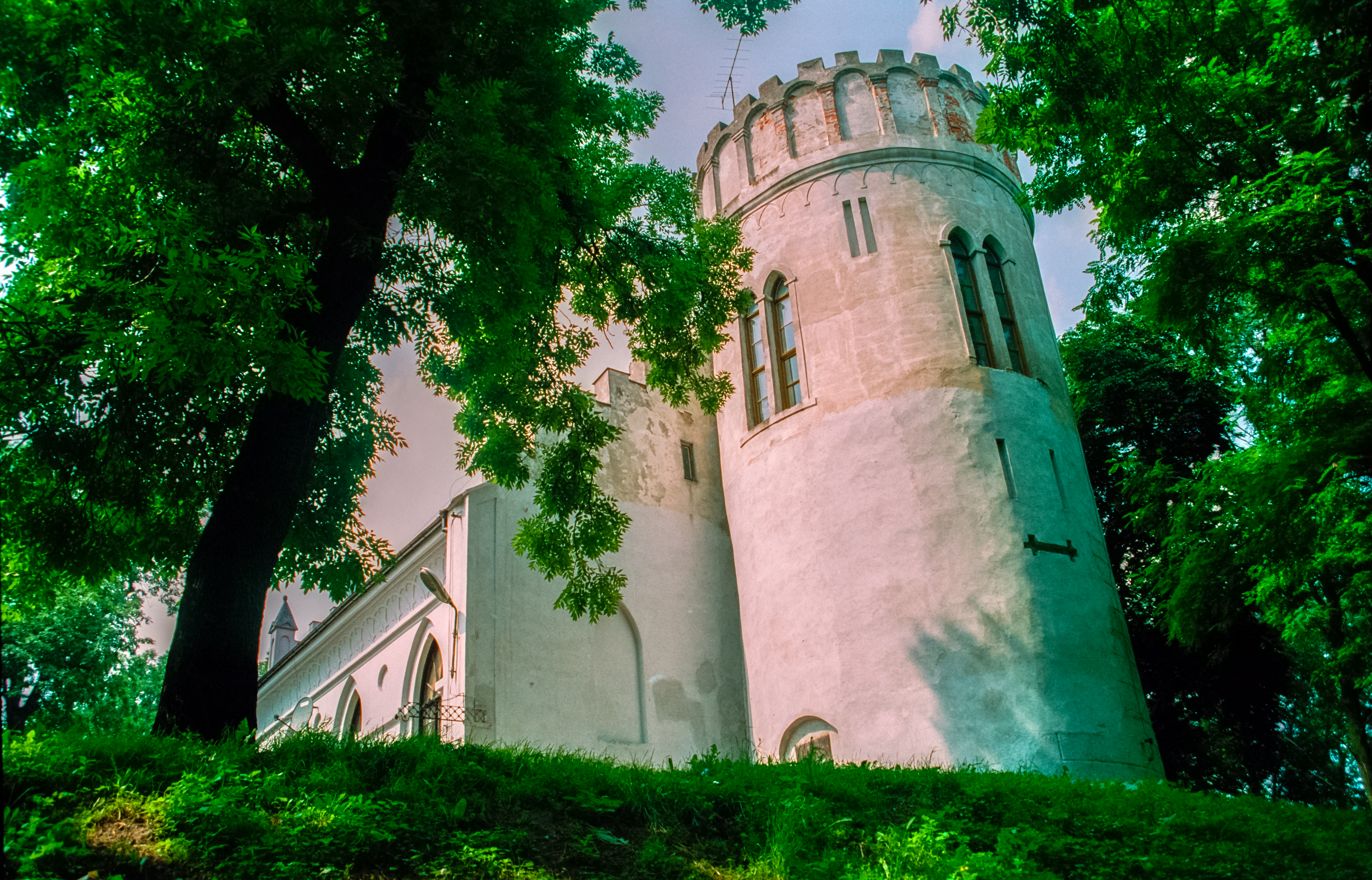 Przedecz, wieża zamkowa, wbudowana w kościół